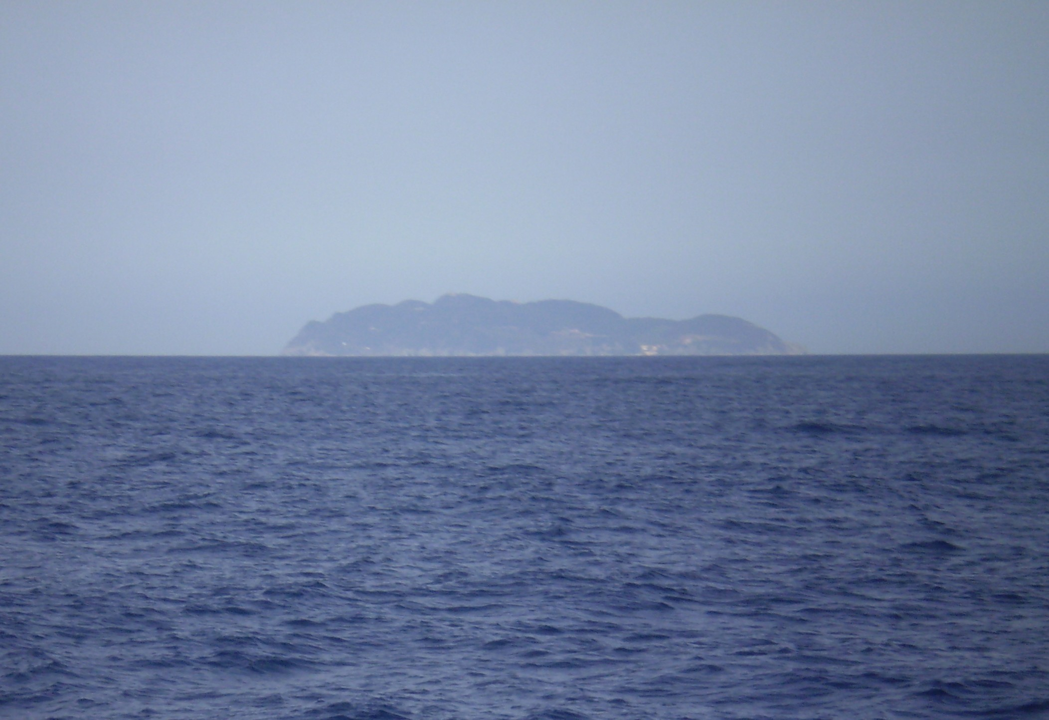 Island La Gorgona, Livorno, Italy